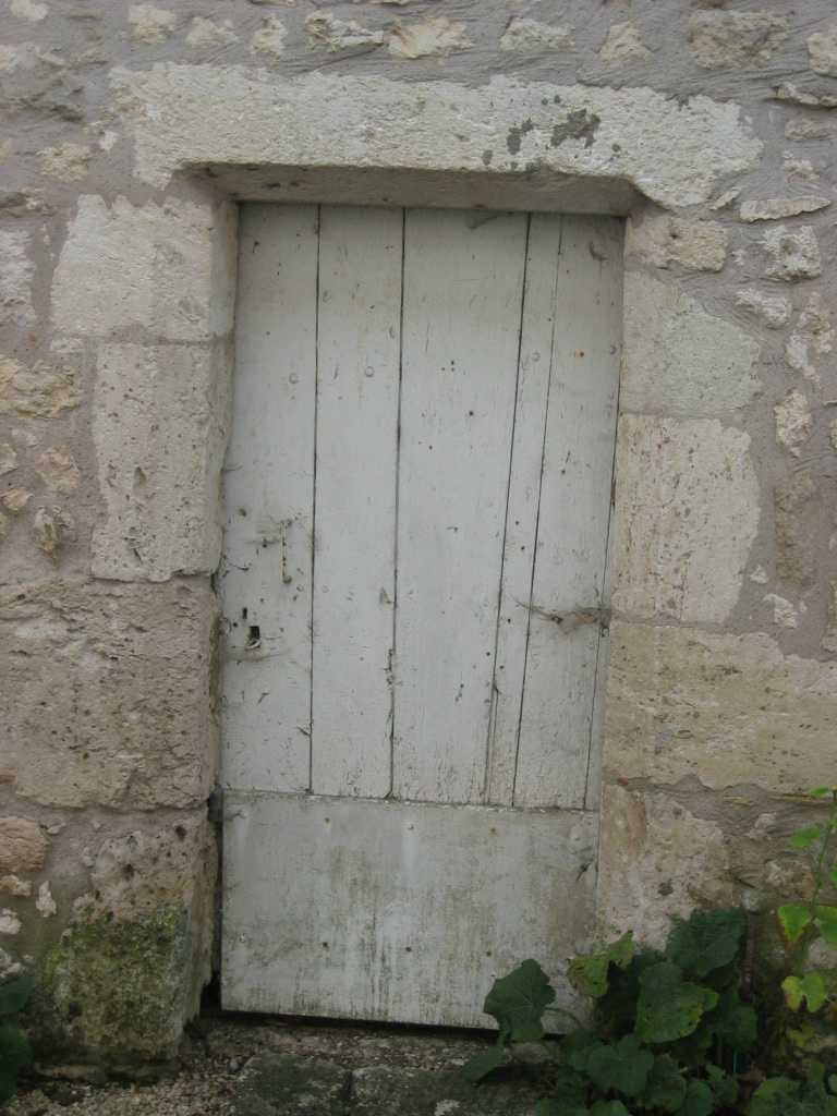 Porte XVIIe siècle, Soumensac Lot et Garonne